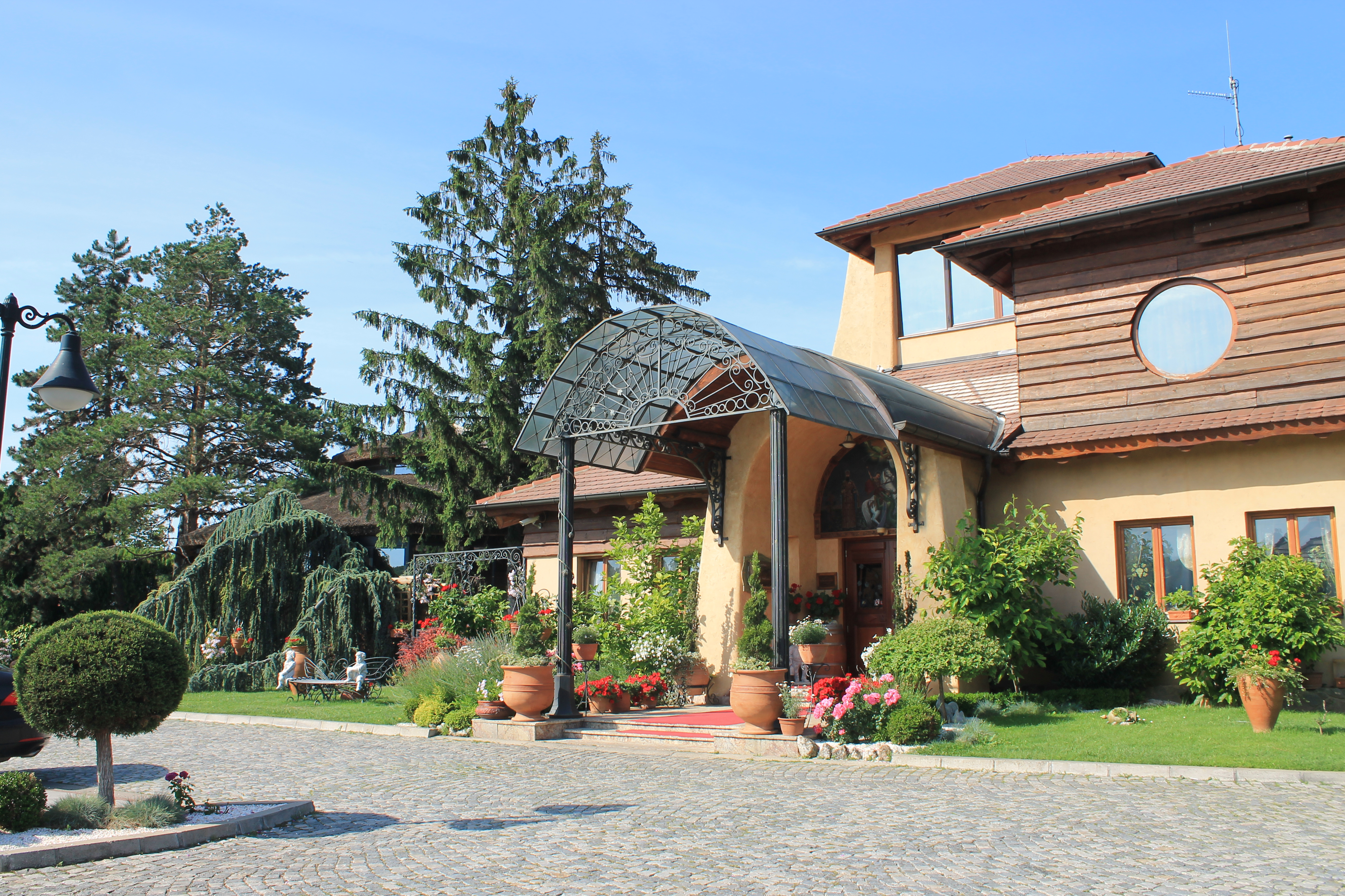 Vinska kuća Kovačević